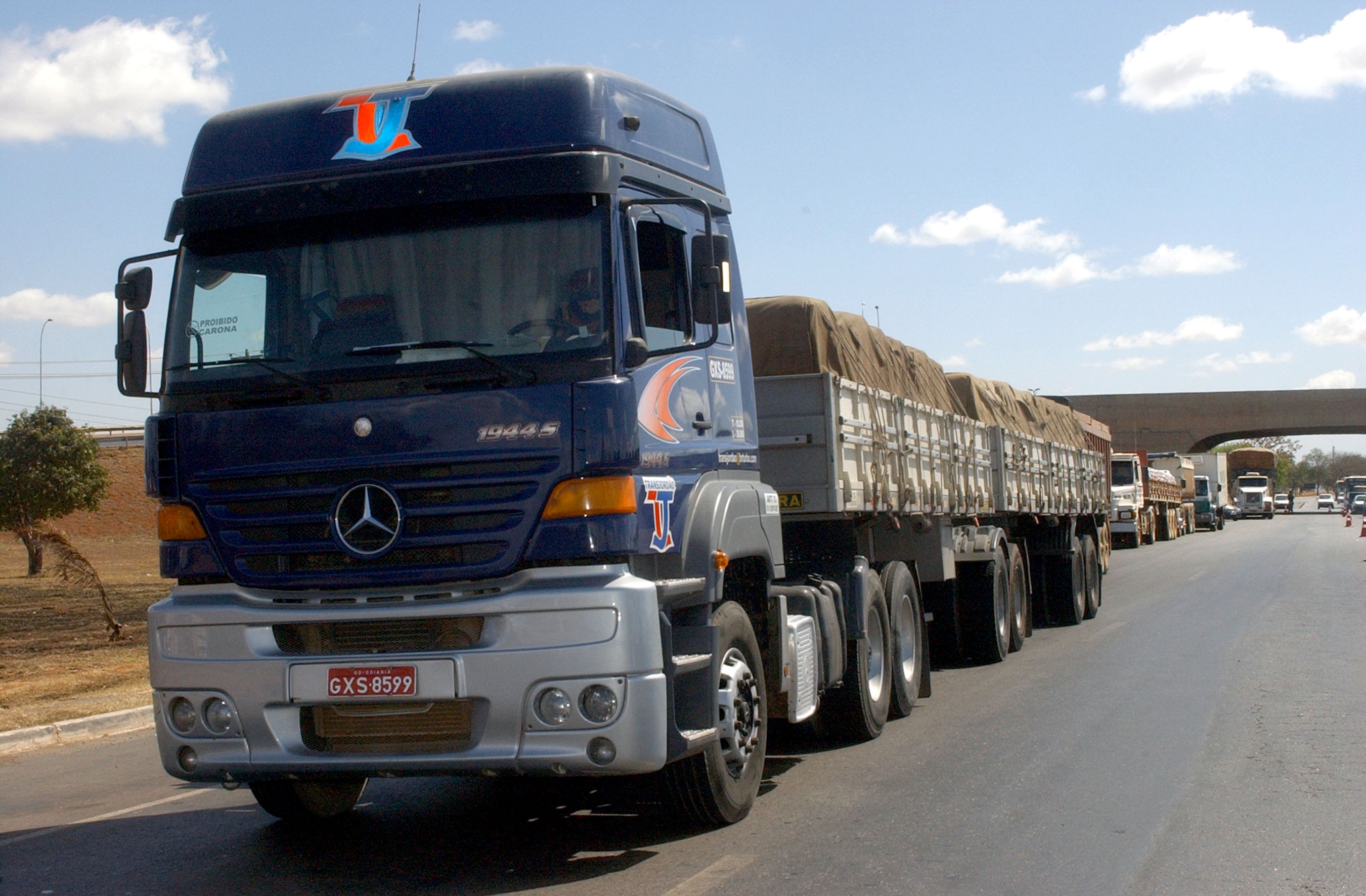 Caminhão da Mercedes-Benz 1944S.